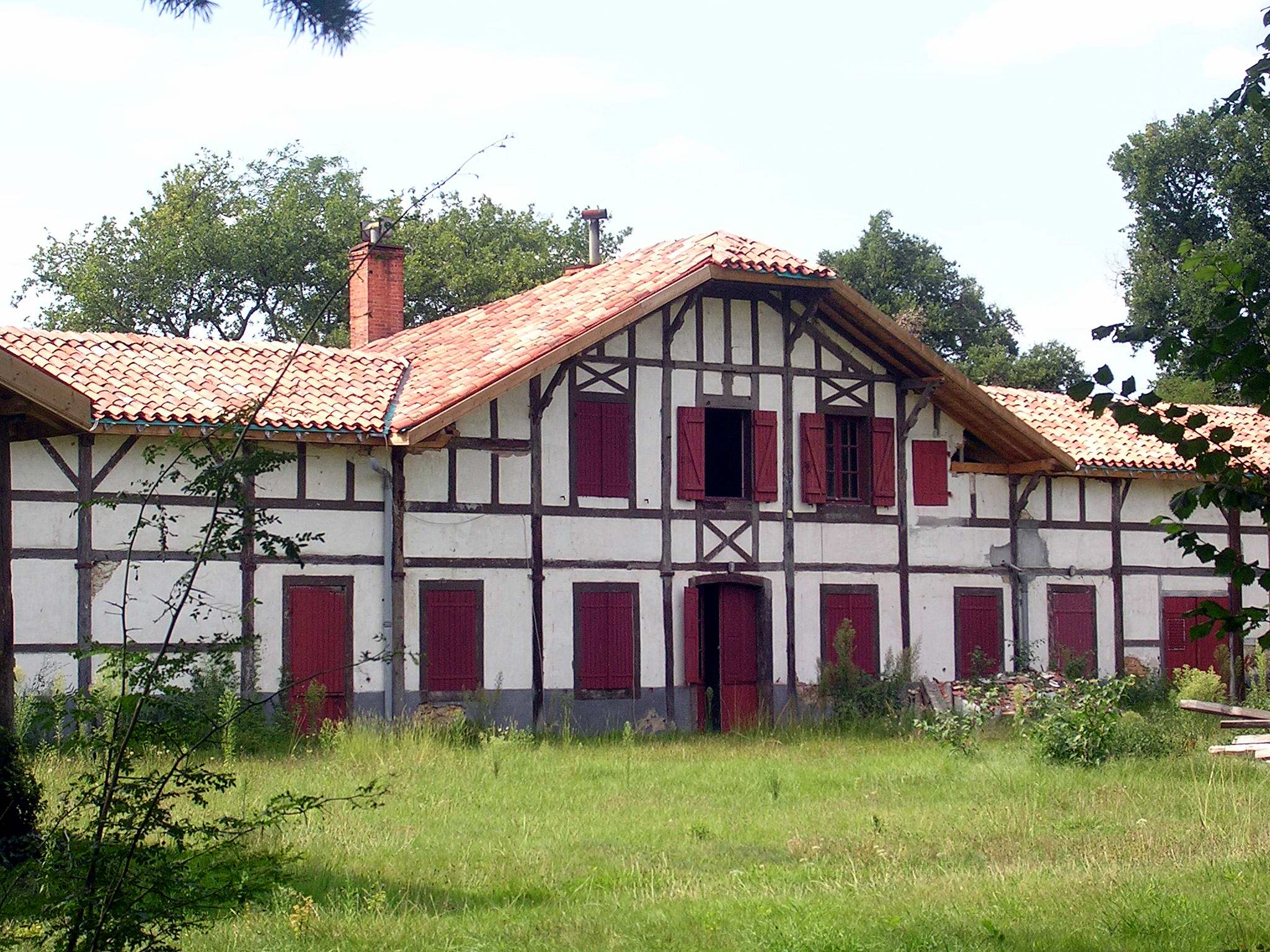 Ferme de Pouy à Solférino, dans le département français des Landes